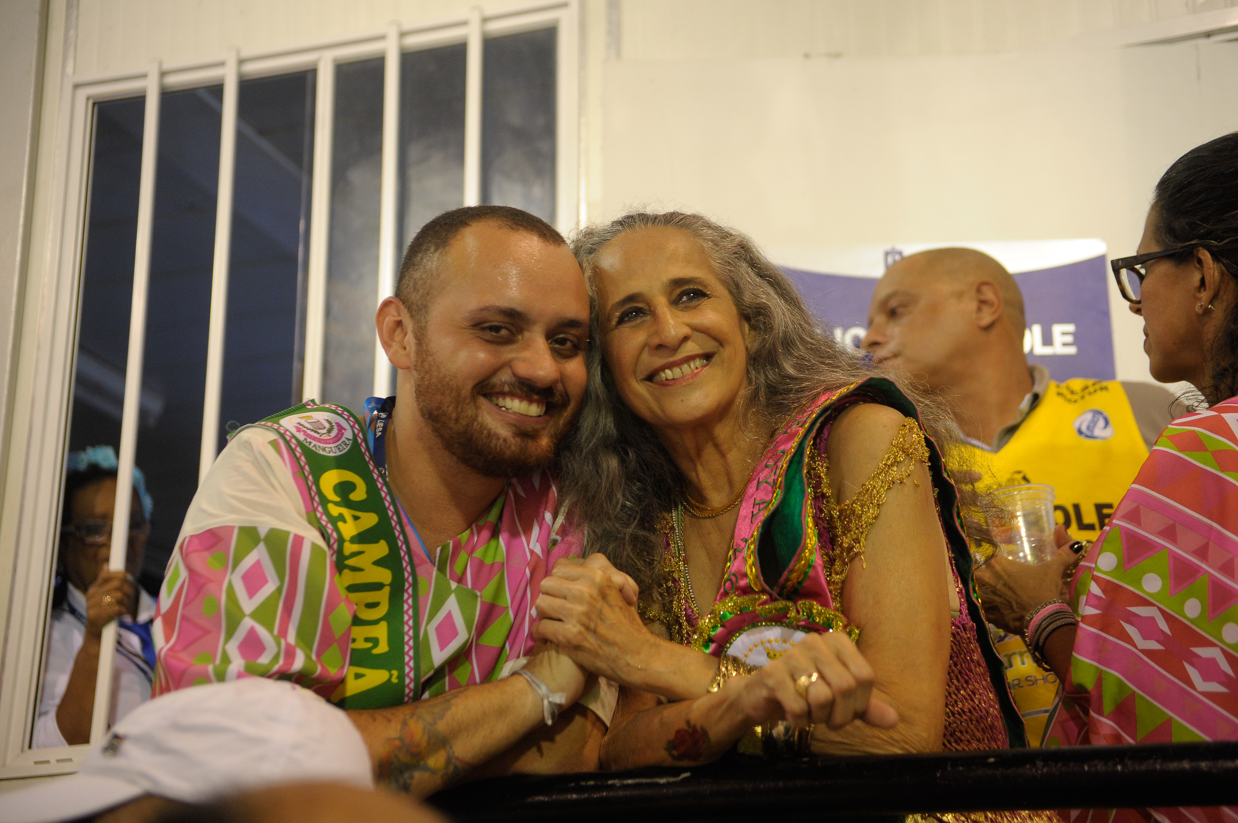 Rio de Janeiro - Mangueira, a grande vitoriosa do carnaval foi a última escola a se apresentar na Marquês de Sapucaí, no desfile das campeãs, com o enredo sobre a Maria Bethânia (Tomaz Silva/Agência Brasil)